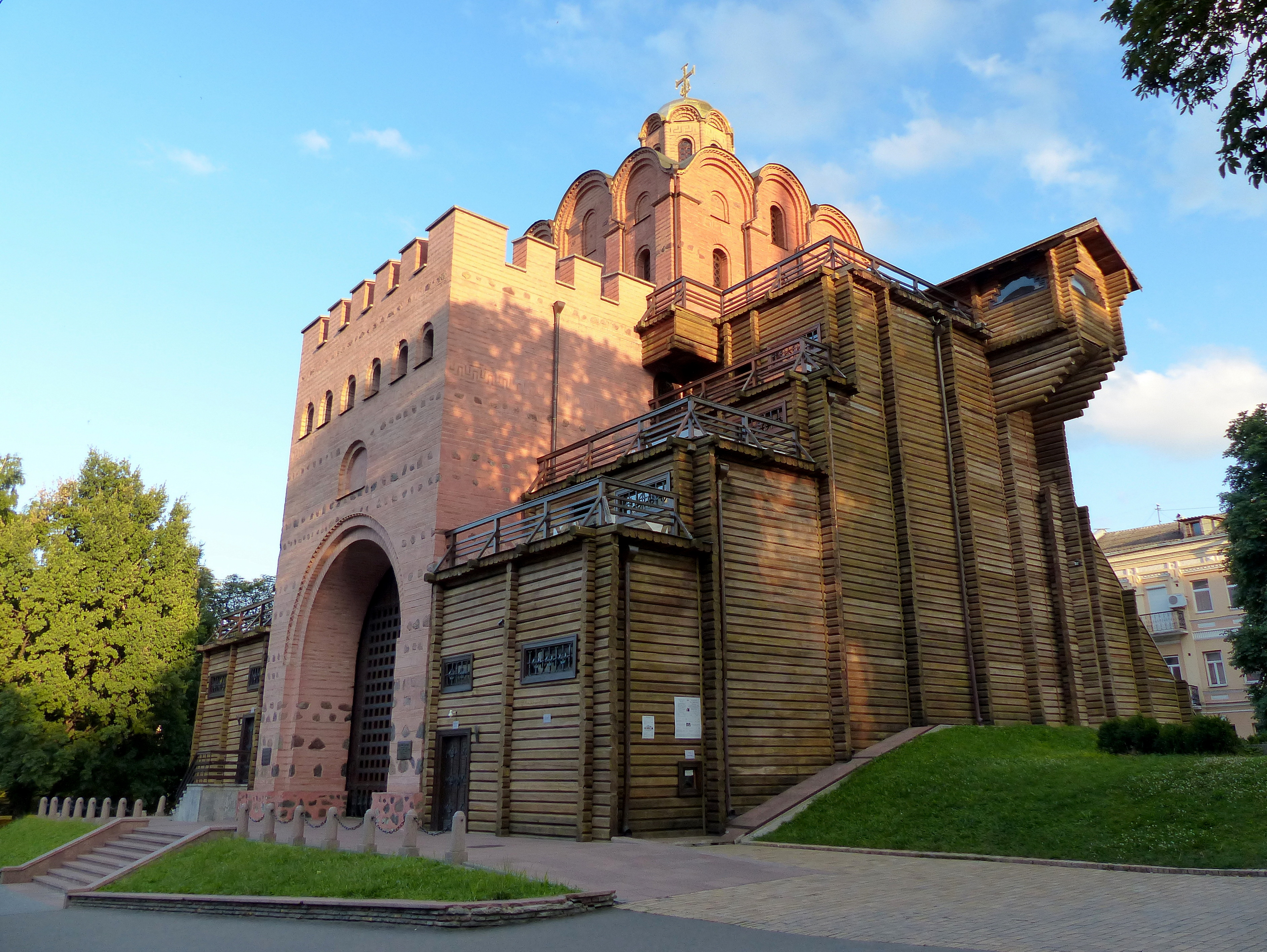 Брама Золота, Київ, Володимирська вул., 40-а